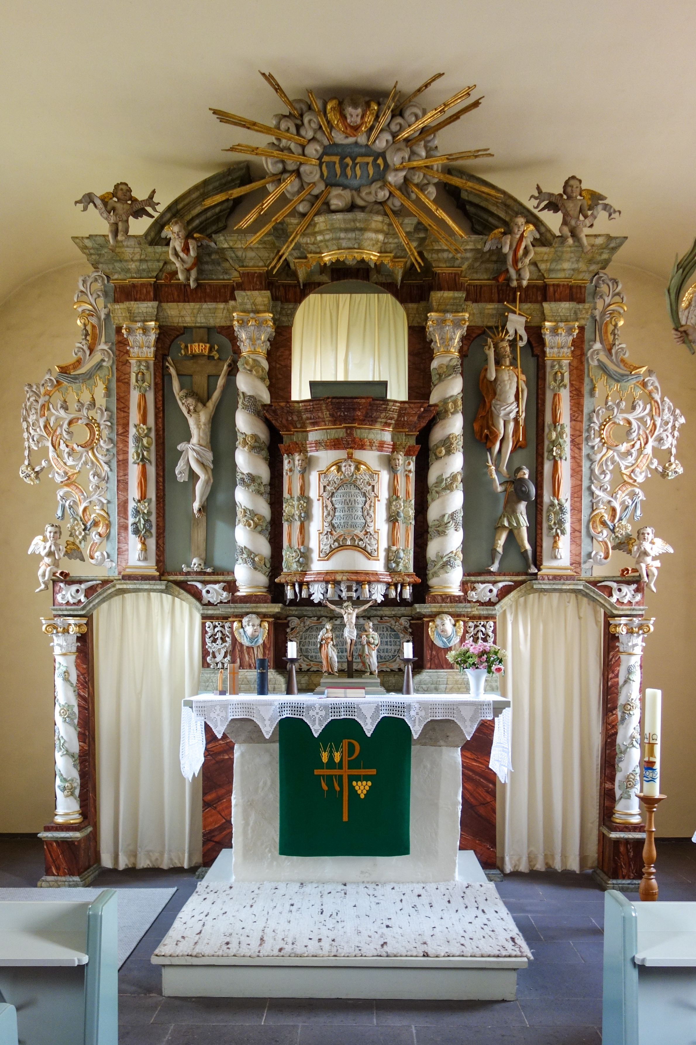 Altar der St. Johannes Kirche in Salzgitter-Immendorf. Die Jahreszahl für die Errichtung der barocken Altarwand ergibt sich aus der in erhabenen Buchstaben geschnitzten Inschrift an der Kanzel: „AVRIBVS ATTENTIS QVI VERBI FVLMINA SENTIS HOSPES IN ALTARI CORDE VENITO PARI“ .DieÜbersetzung lautet: „Du Gast, der du die Blitze des Wortes spürst, du sollst mit aufmerksamen Ohren und eben solchem Herzen zum Altar kommen.“ Liest man die groß geschriebenen Buchstaben als lateinische Ziffern (U wurde durch V ersetzt), so ergibt deren Summe die Jahreszahl 1740 der Schenkung des Altars.